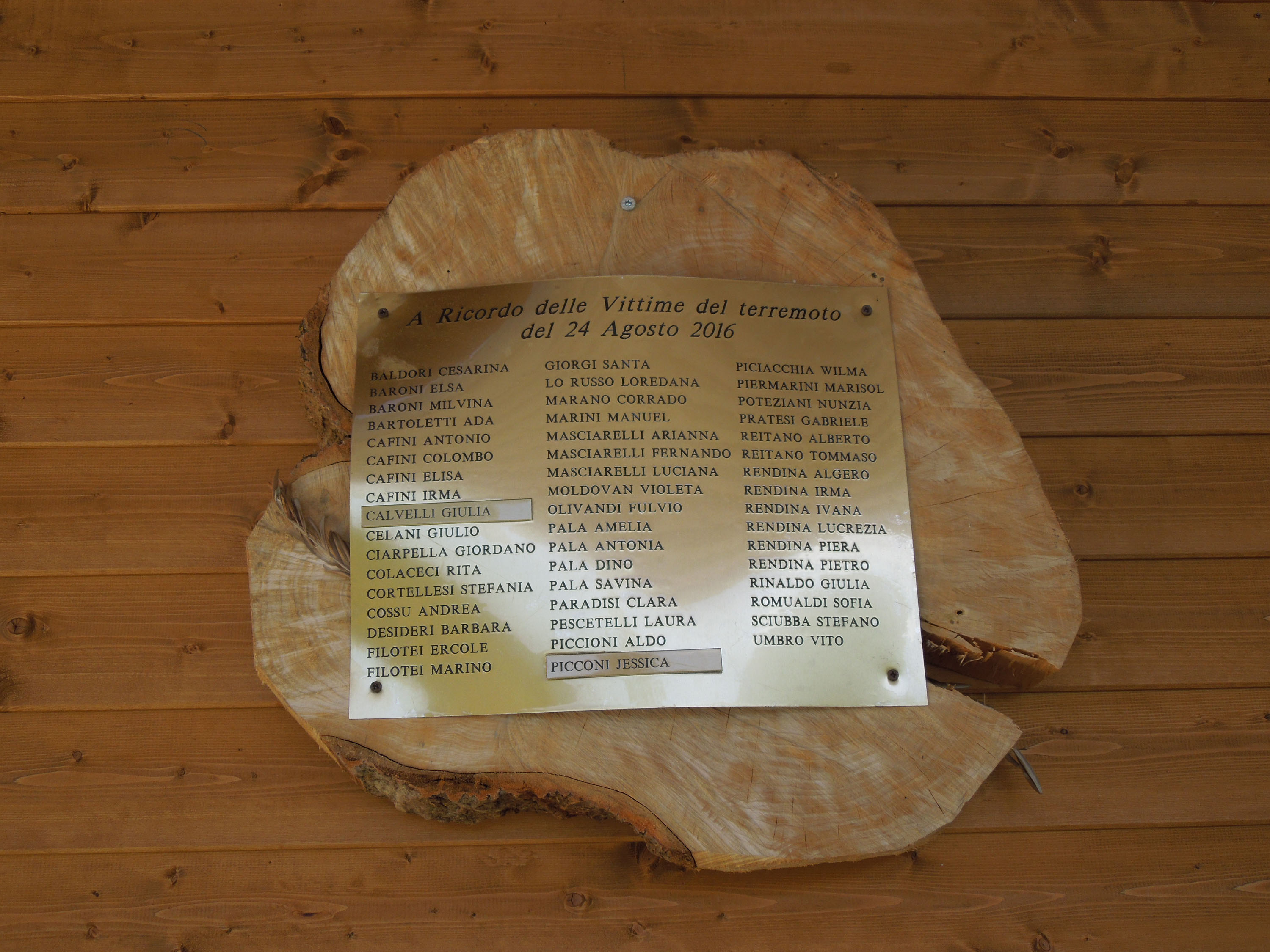 Immagine della targa che ricorda le vittime del terremoto del 24 agosto 2016 posta sulla facciata della nuova Cappellina del camposanto di Pescara del Tronto, in provincia di Ascoli Piceno.